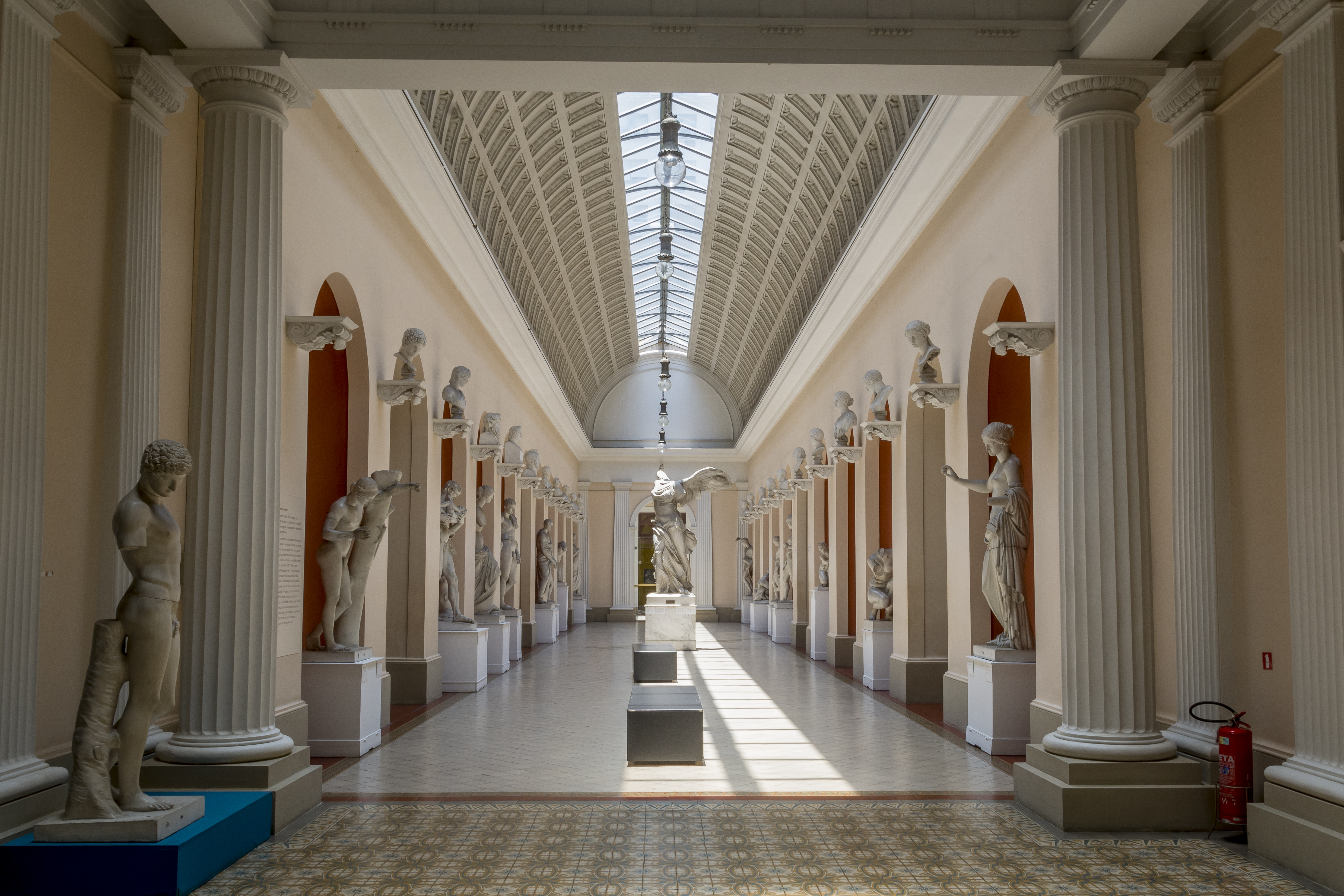 Museu Nacional de Belas Artes